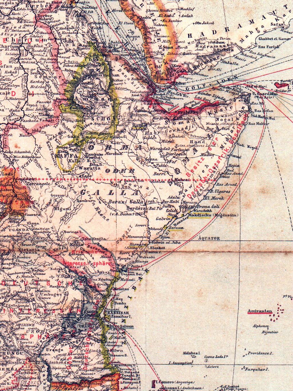 Übersichtskarte von Afrika, Stand der kolonialen Aufteilung 1887, Besitzungen und Schutzgebiete - nach der deutsch-britischen Interessensabgrenzung von 1886, vor der Aufteilung des sansibarischen Festlandbesitzes 1888